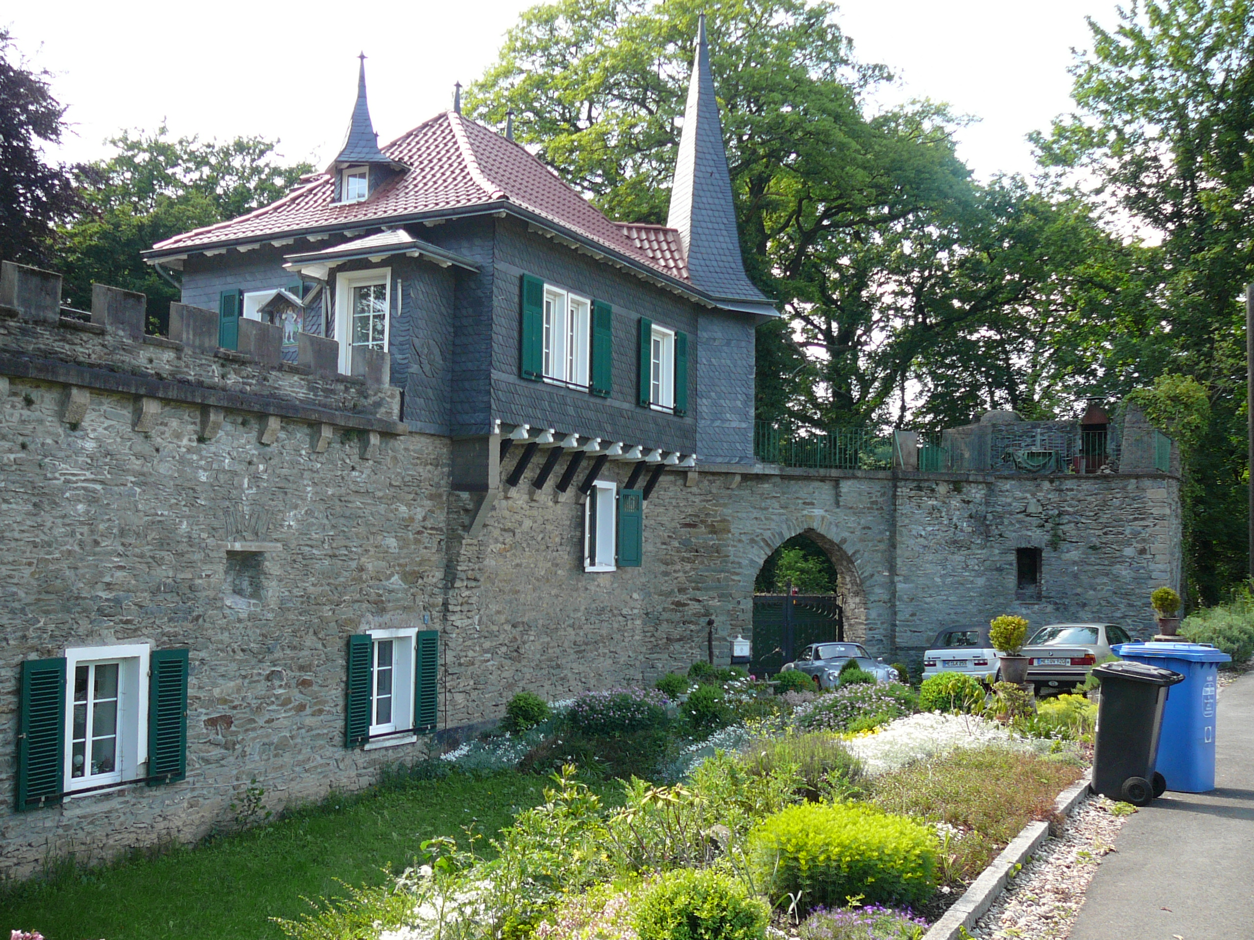 Schloss Aprath in Wülfrath an der Grenze zu Wuppertal